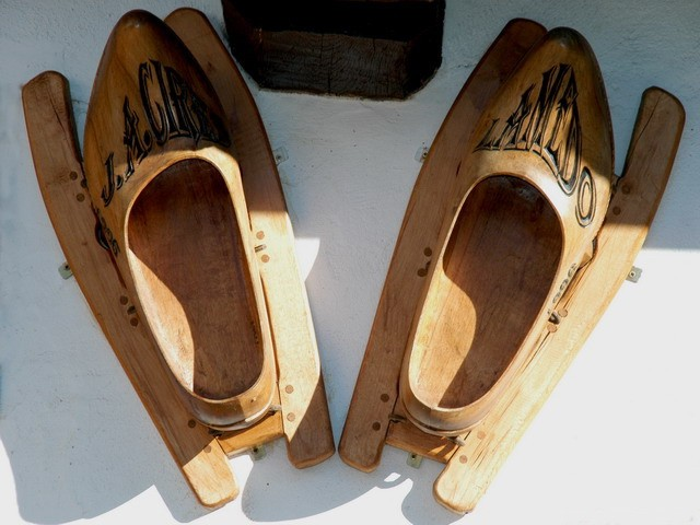 Albarcas o almadreñas en Lamedo © jlgomezlinares